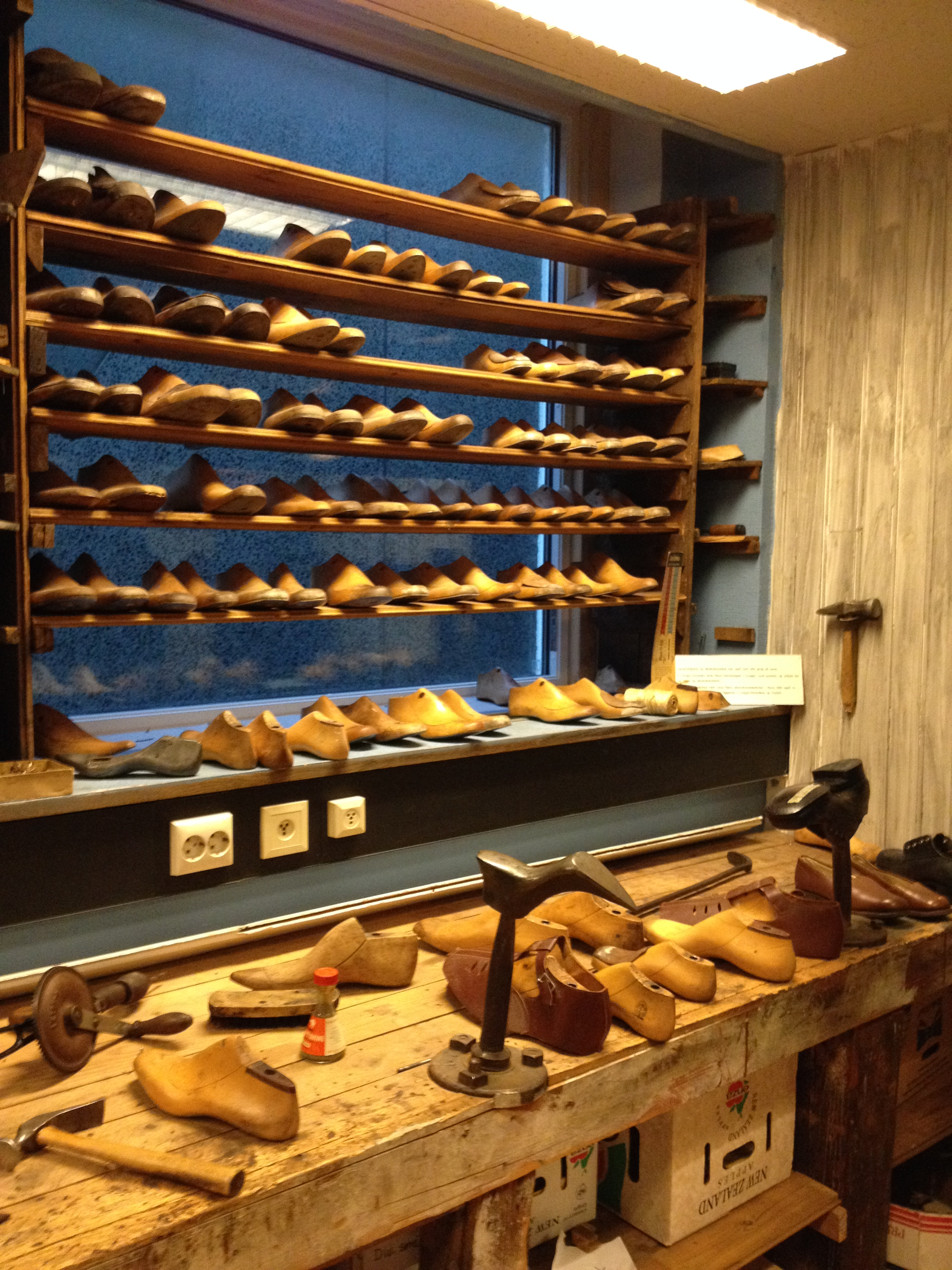 Byhistorisk utstilling på Vitenfabrikken januar 2015.